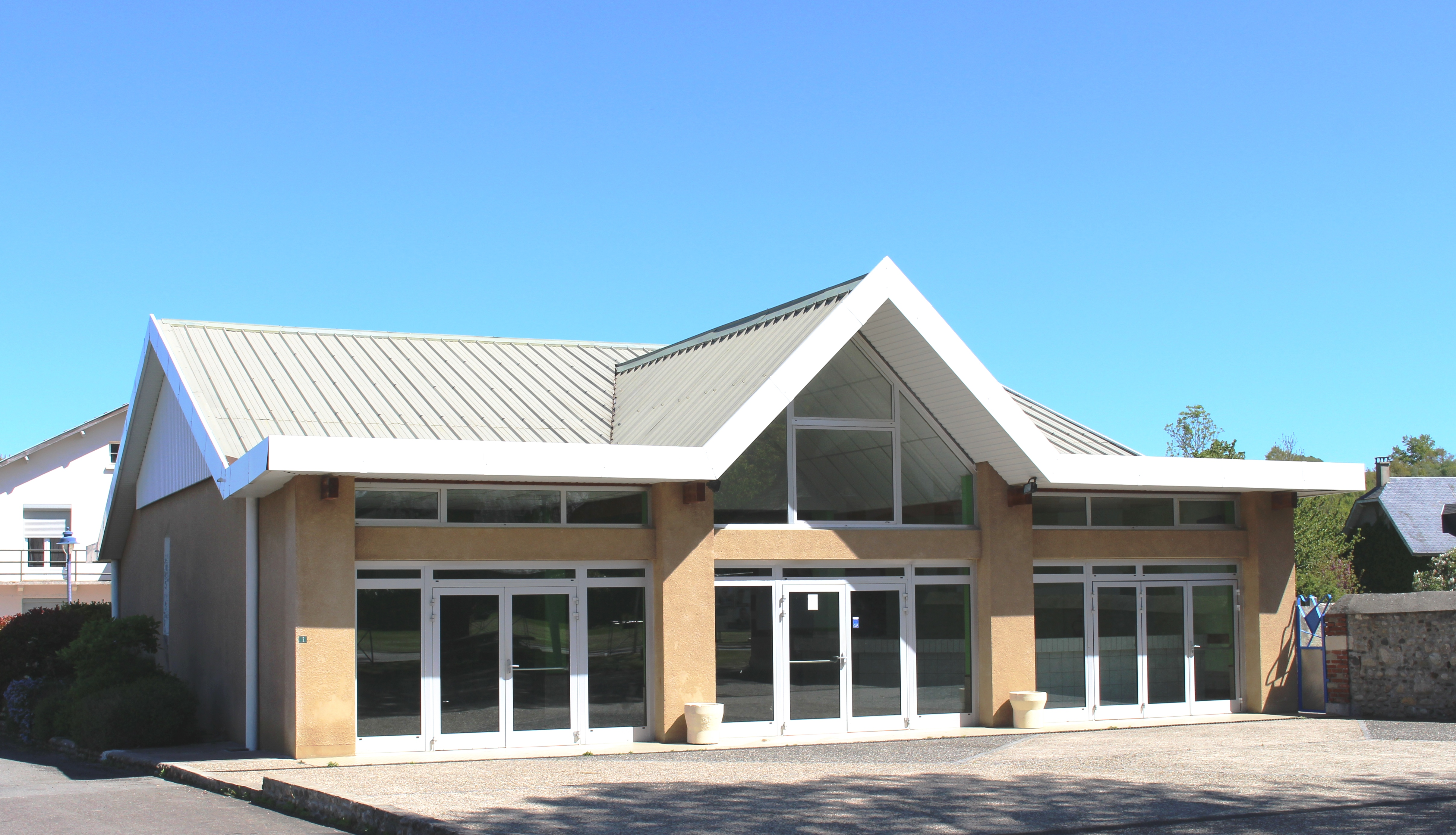 Salle des fêtes de Vielle-Adour (Hautes-Pyrénées)